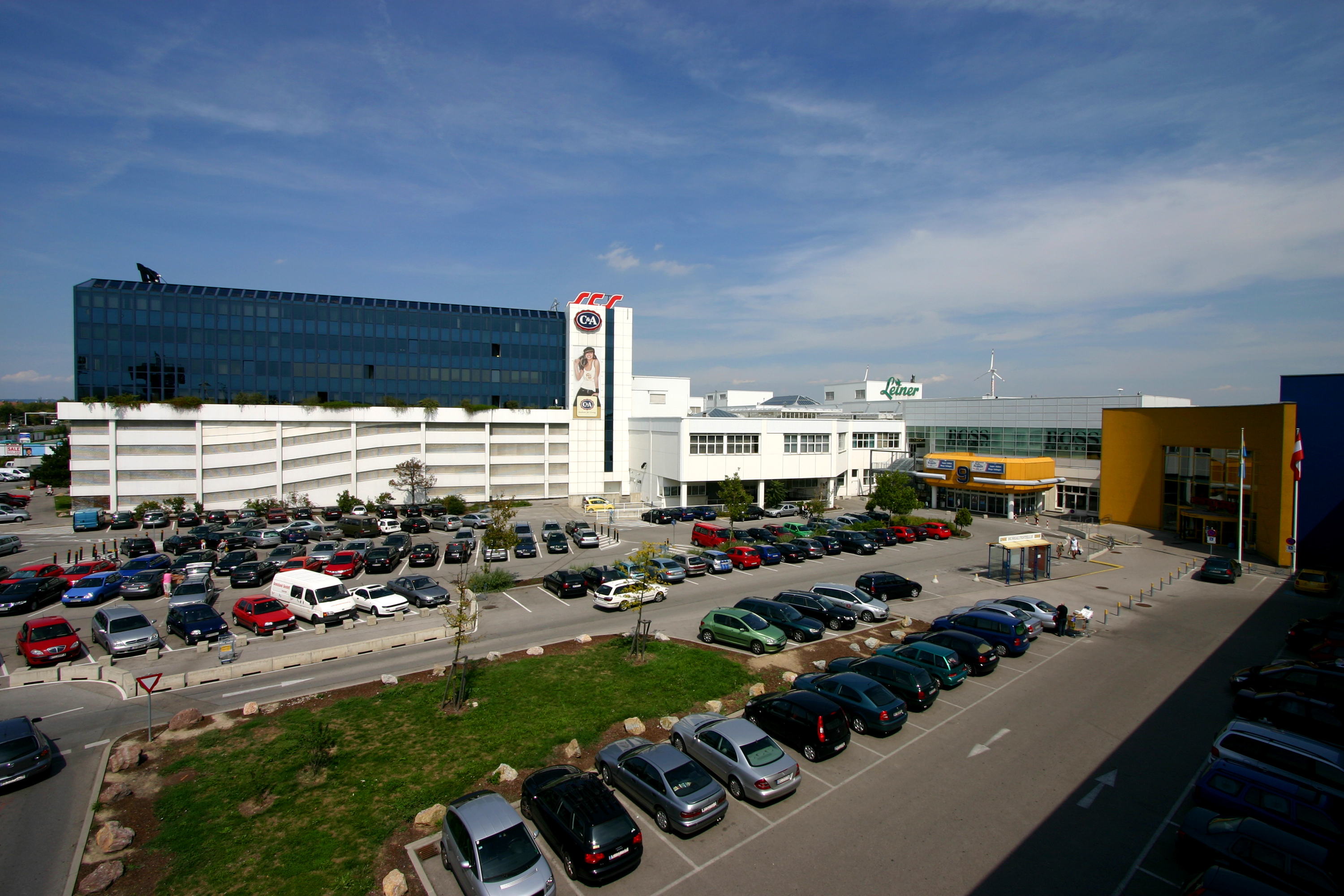 Teil der Shopping City Süd in Vösendorf. Links das SCS Bürocenter. Rechts einer der Haupteingänge und der Eingang zum Einrichtungsgeschäft IKEA.